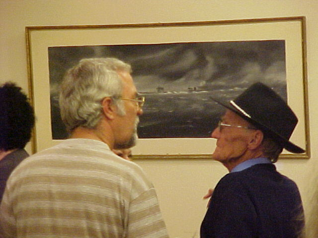 Suso Machín durante una exposición suya.